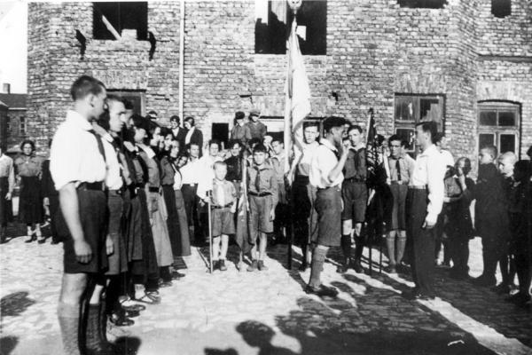 הקן בעיר דומברובה היה שוקק חיים.רבים מחניכי הקן הזה ייסדו את קיבוץ עין השופט-בתמונה מפקד שומרי ליד הקן